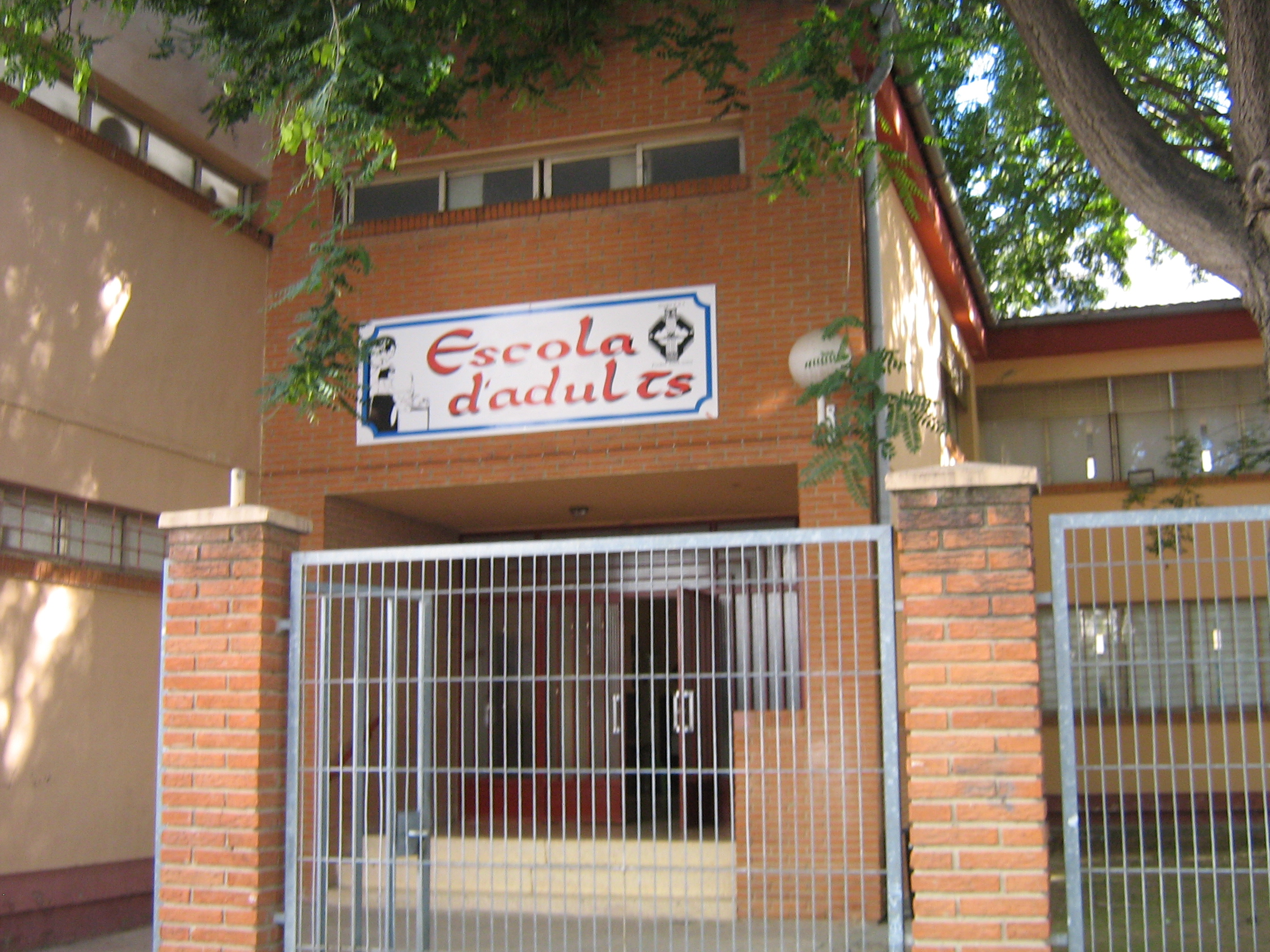 EPA de Benetússer